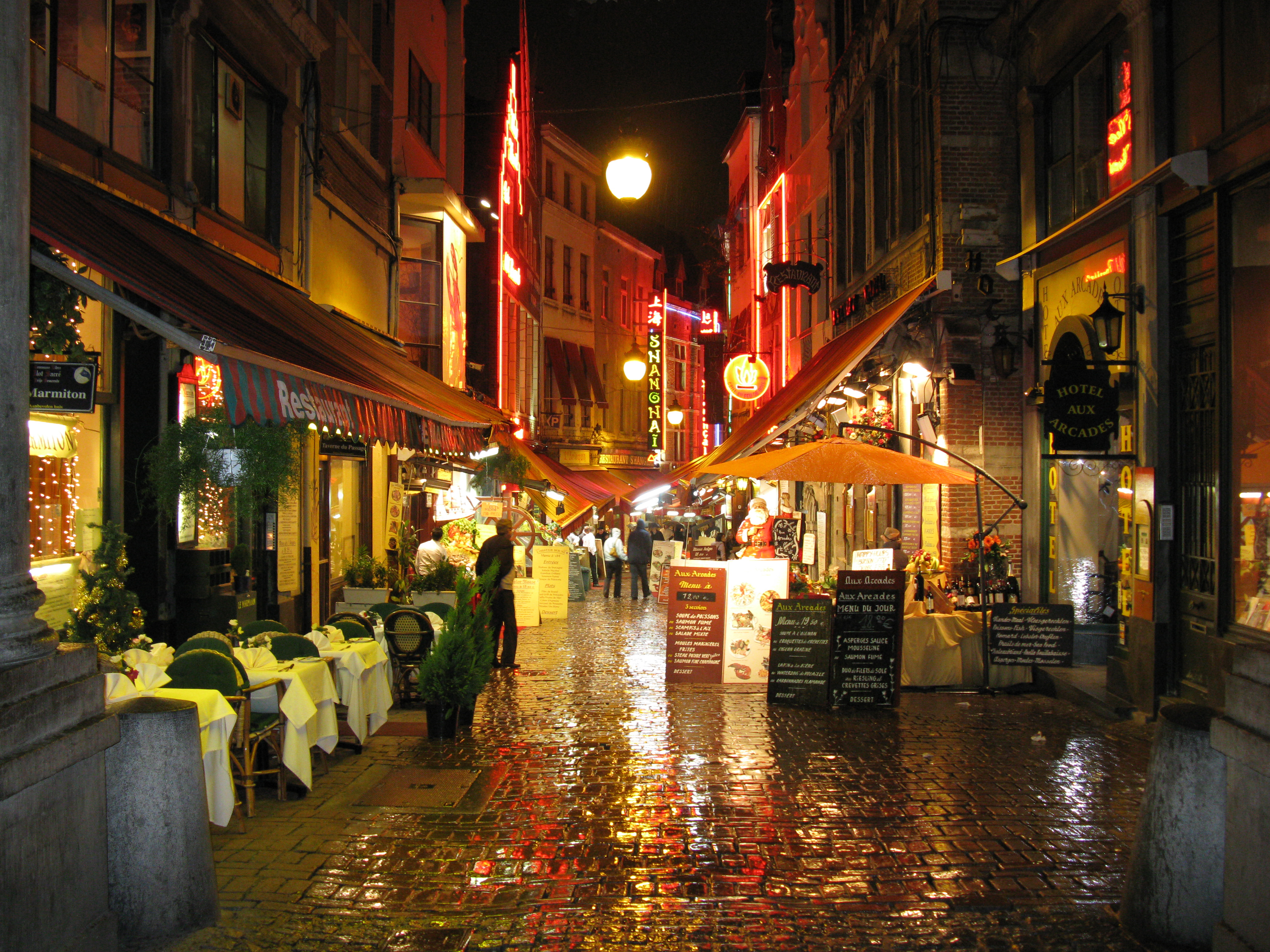 Rue des Bouchers / Beenhouwersstraat, Brussels, Belgium